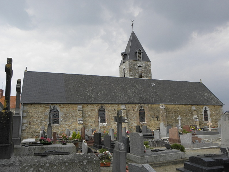 Église Saint-Vigor à Tanis (50).